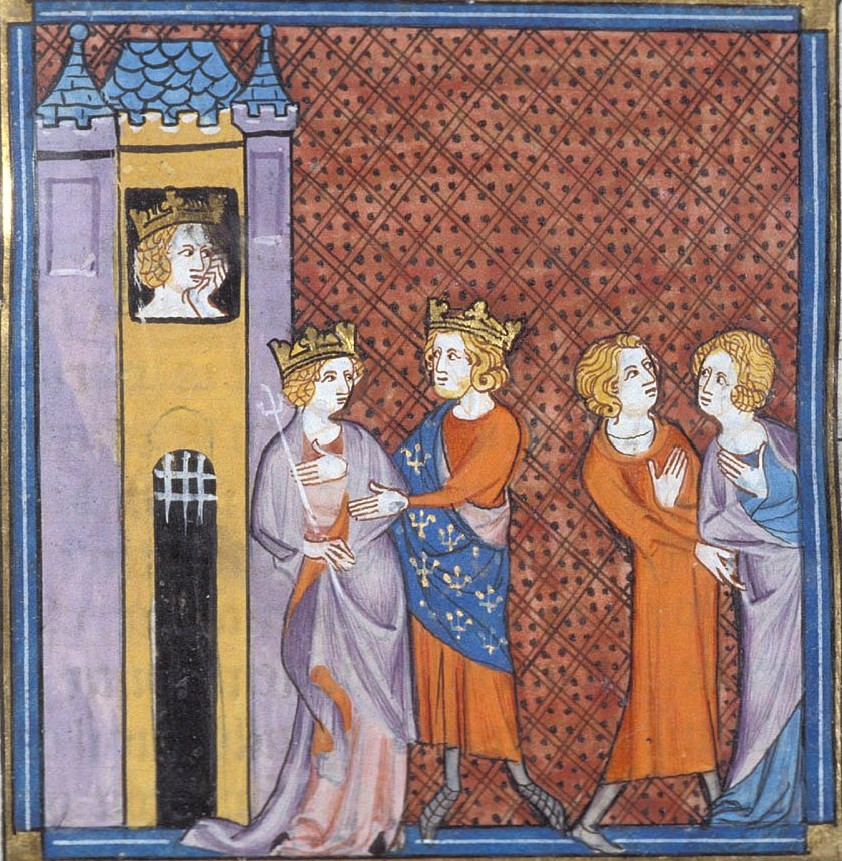 Filip I. a jeho ženy